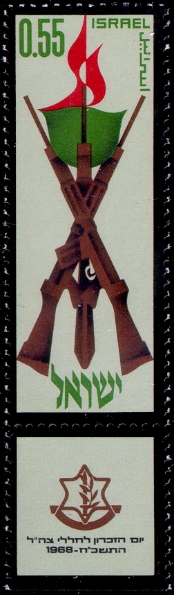 בול יום הזיכרון תשכ"ח